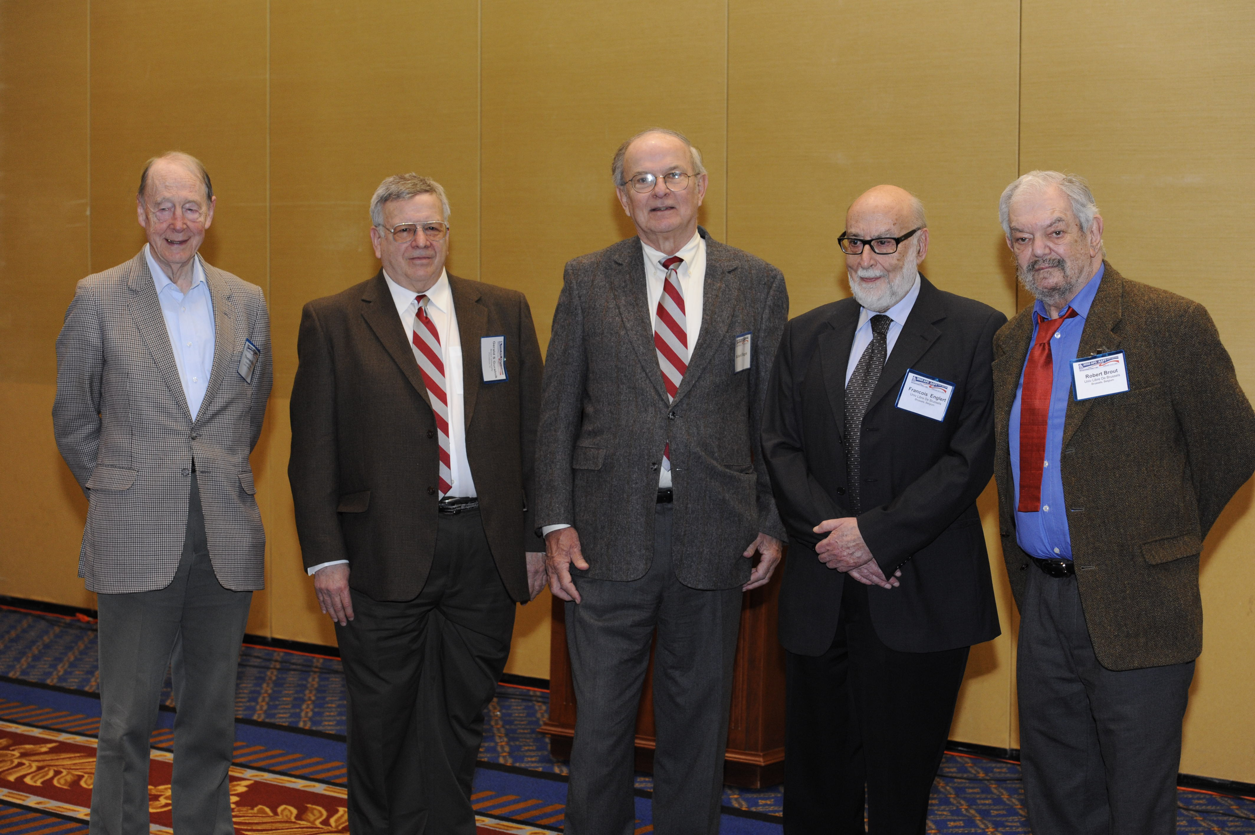 2010 Sakurai Prize Winners - (L to R) Kibble, Guralnik, Hagen, Englert, and Brout